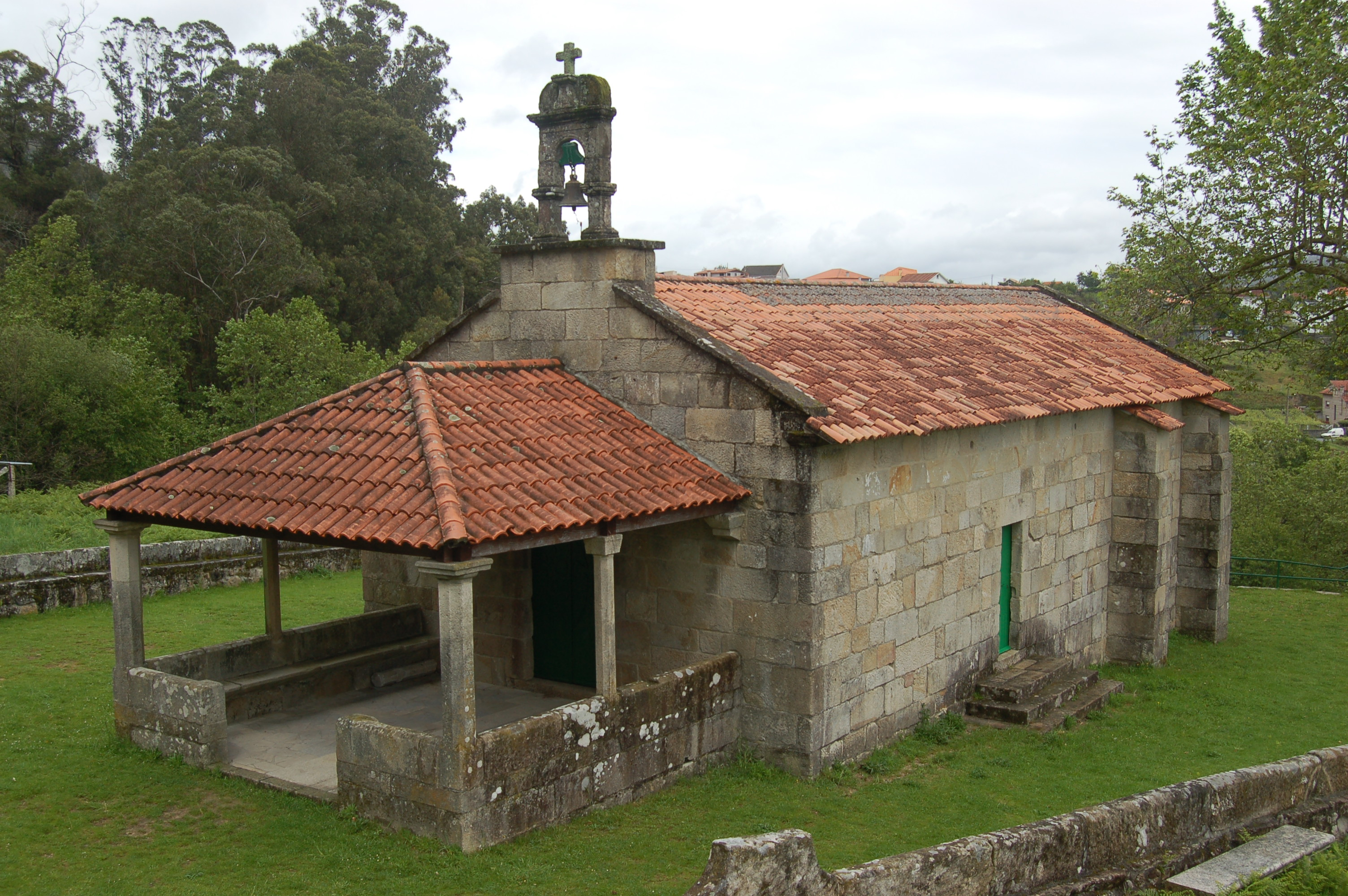 Capela da Virxe da Renda en Combarro (Poio)